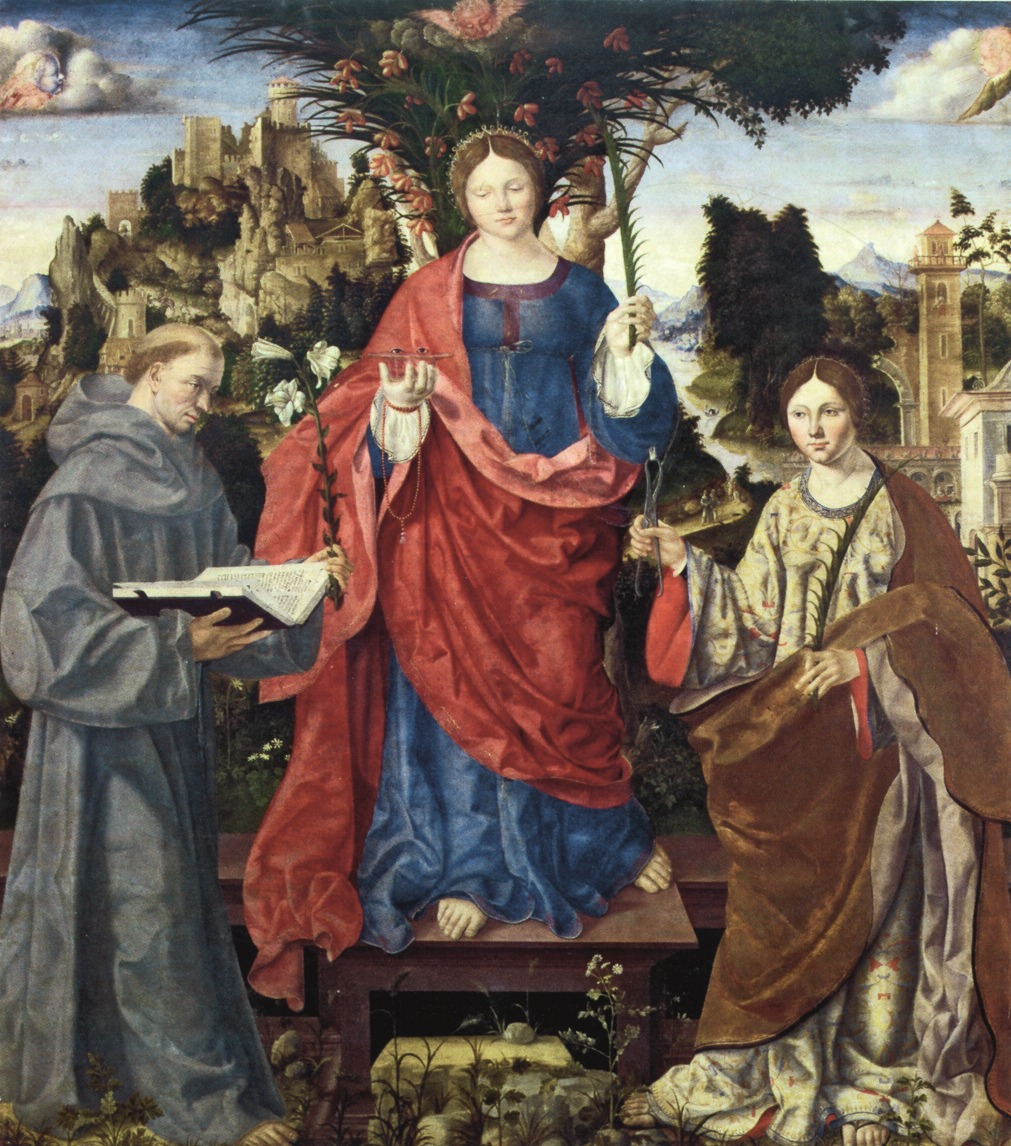 Francesco Pagani Sant'Antonio da Padova e Santa Apollonia, 1518 ca. - Porcia, chiesa di S. Giorgio